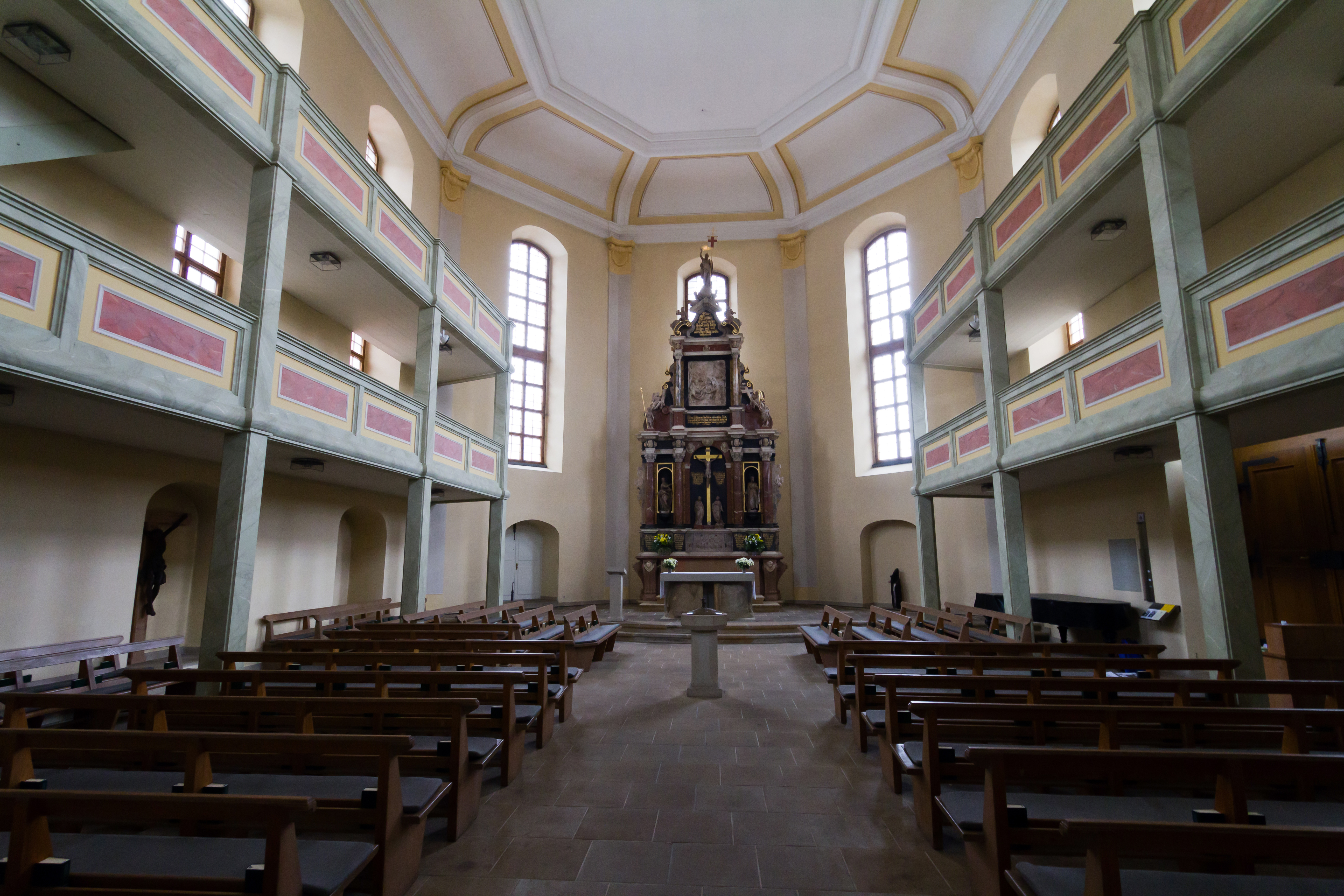 Loschwitzer Kirche, Blick vom Eingang zum Altar